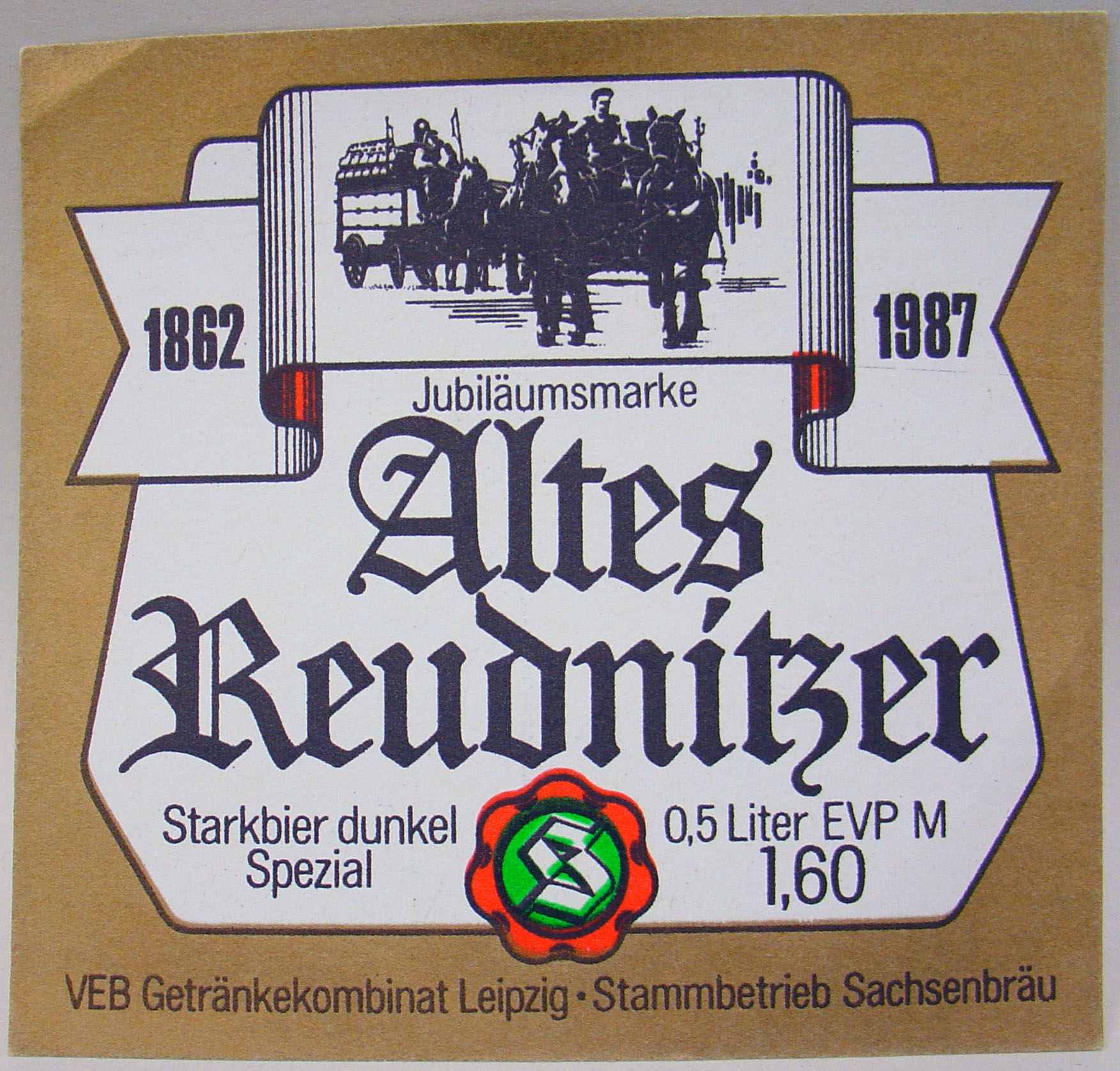 Sachsenbräu Leipzig, Altes Reudnitzer Starkbier dunkel Etikett (DDR)